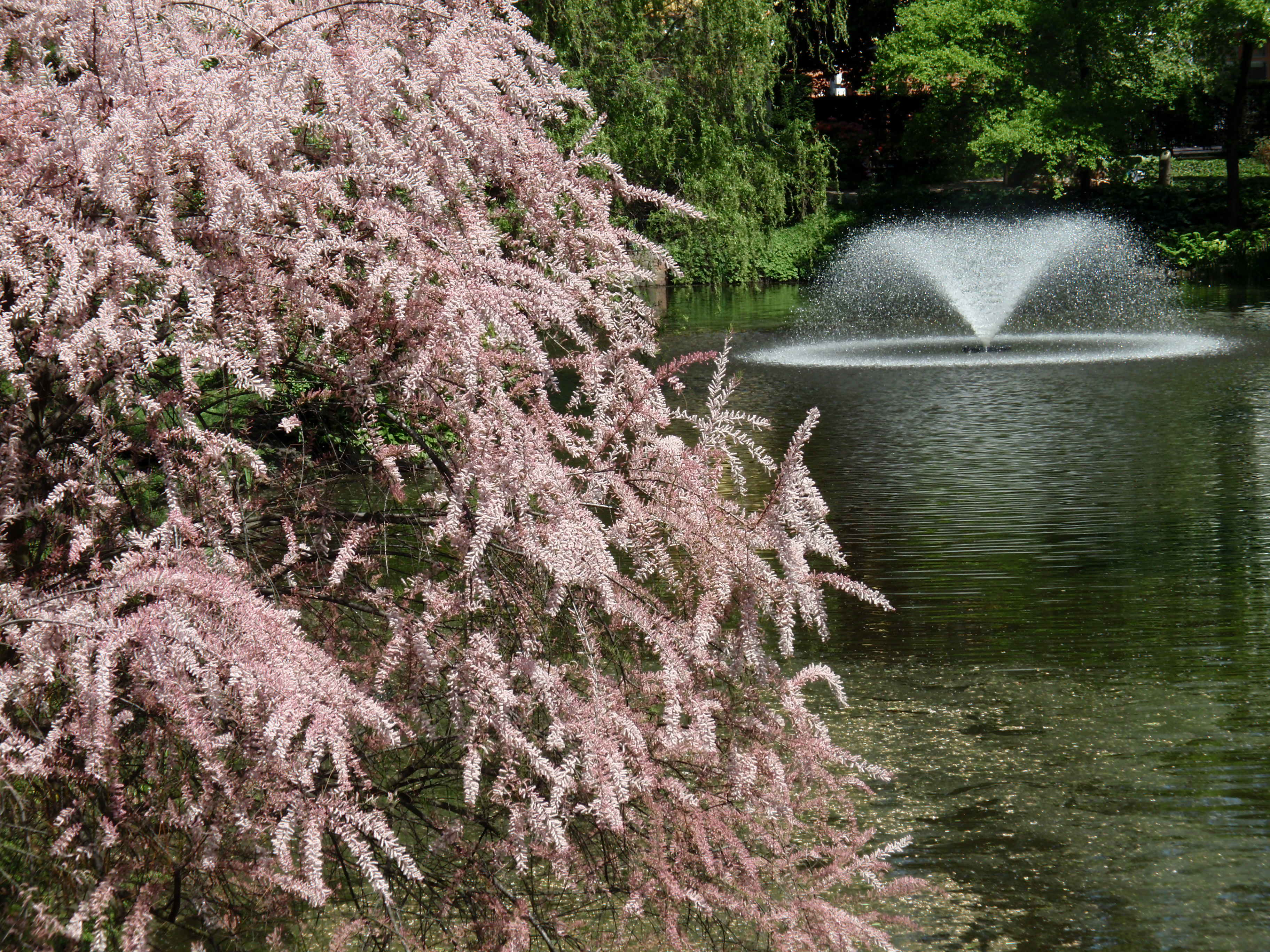 Wrocław, Ogród Botaniczny